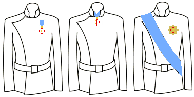 Modo di indossare le decorazioni dell'Ordine Costantiniano di Napoli (Regno delle Due Sicilie)